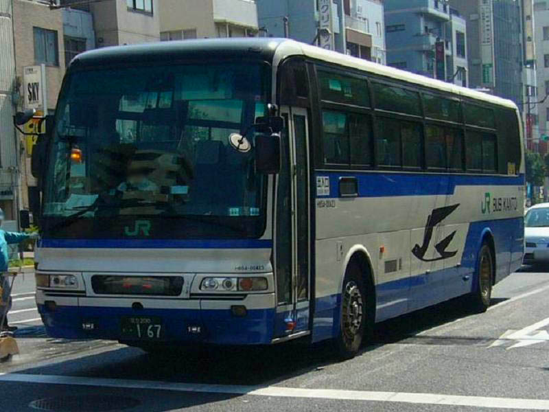 登録番号： 足立200か・167 ジェイアールバス関東(JR Bus Kanto)東京支店所属 car no.車番H654-00423 東京～沼津線用 三菱ふそう・エアロバス KL-MS86MP